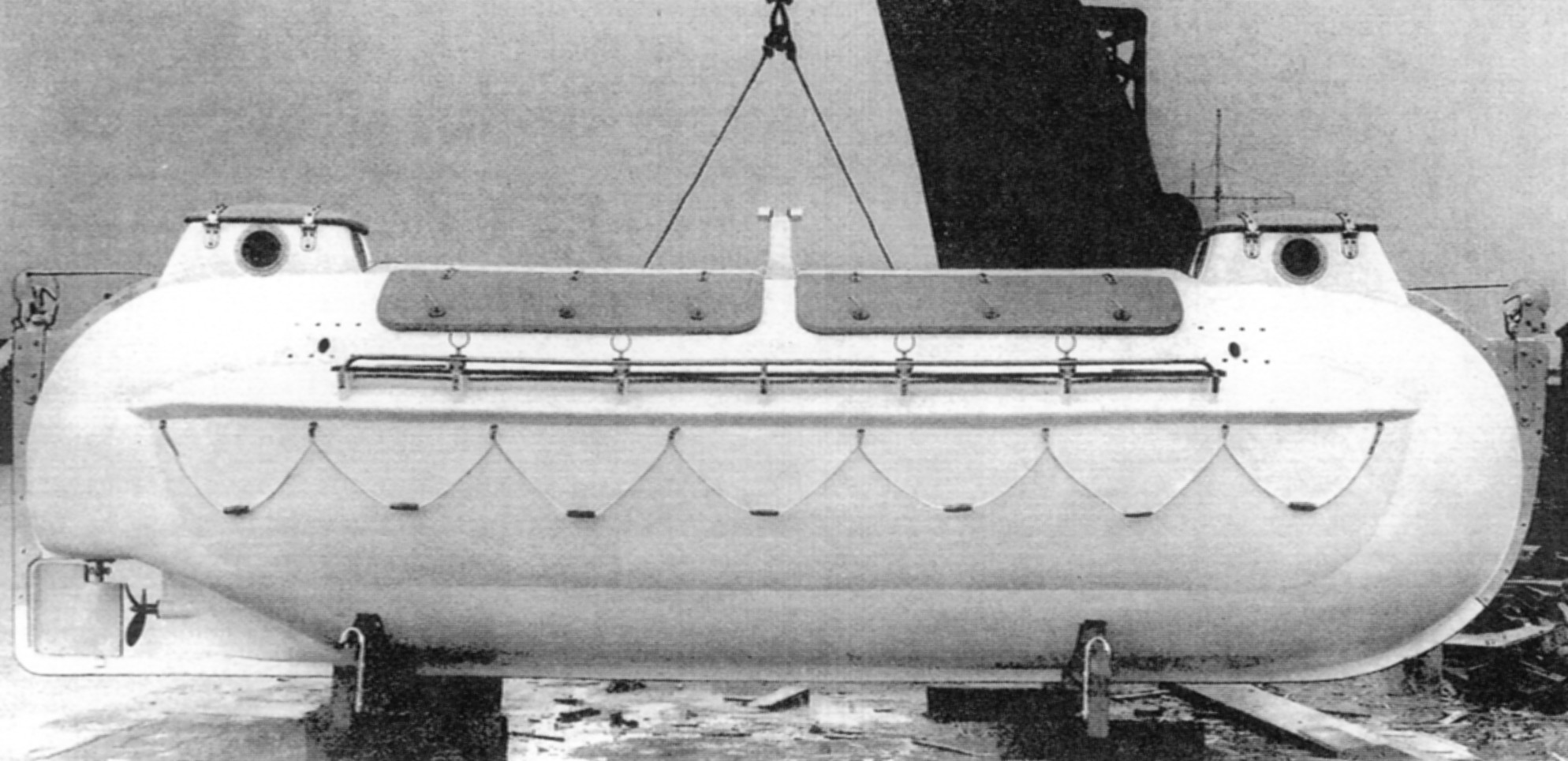 geschlossenes und unsinkbares Rettungsboot von Gustav Kuhr